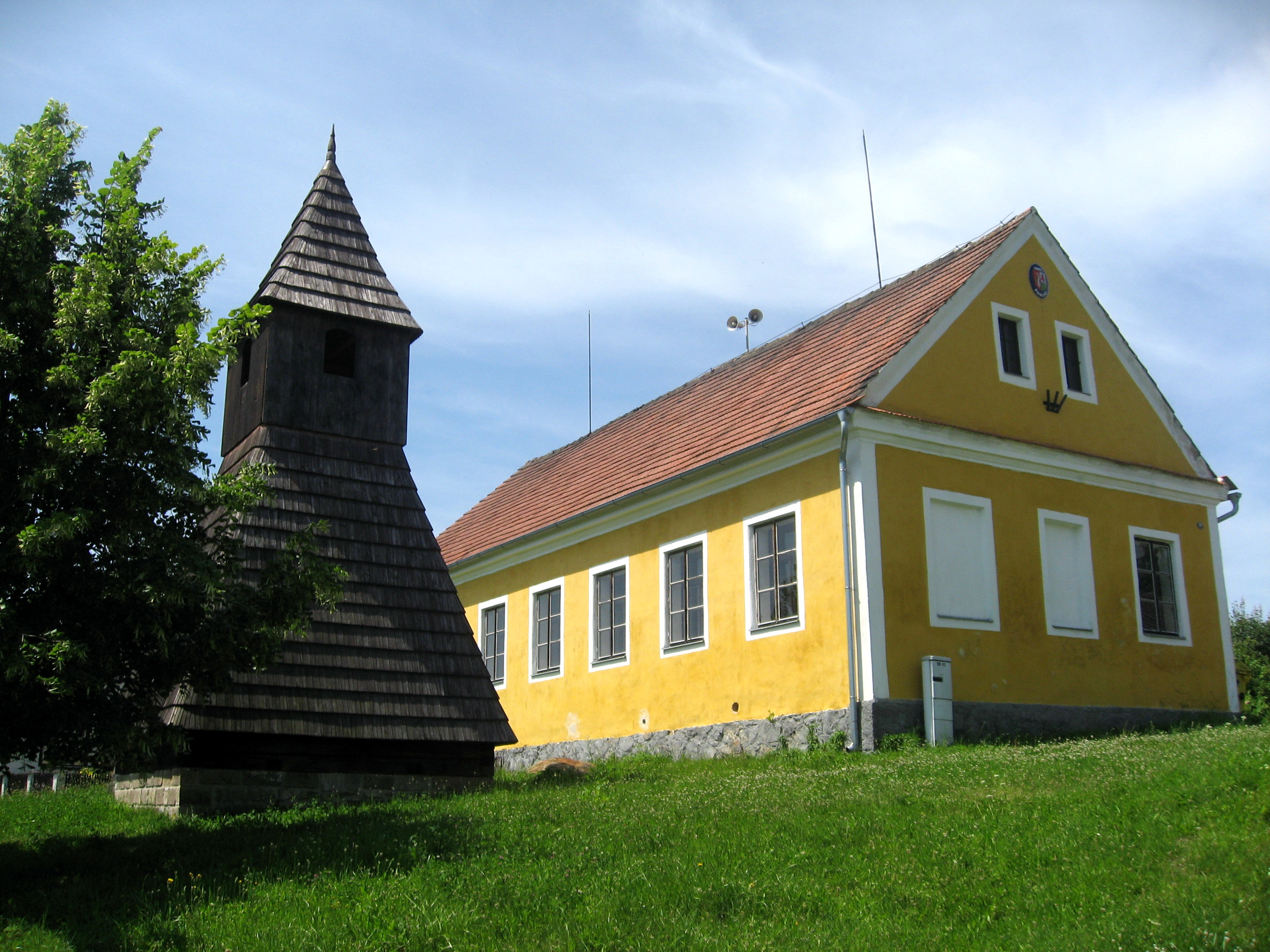 Pohleď, dříve Horní Pohleď